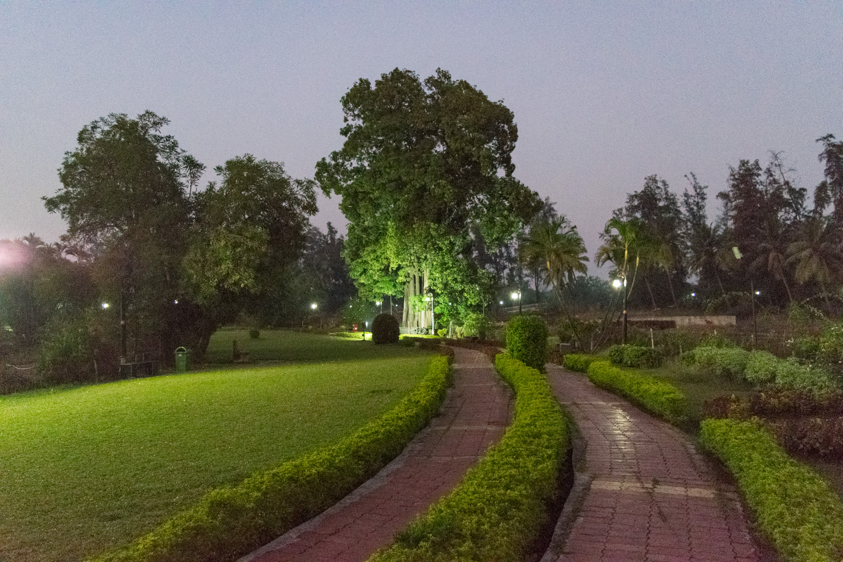 Vanganga Garden, Silvassa